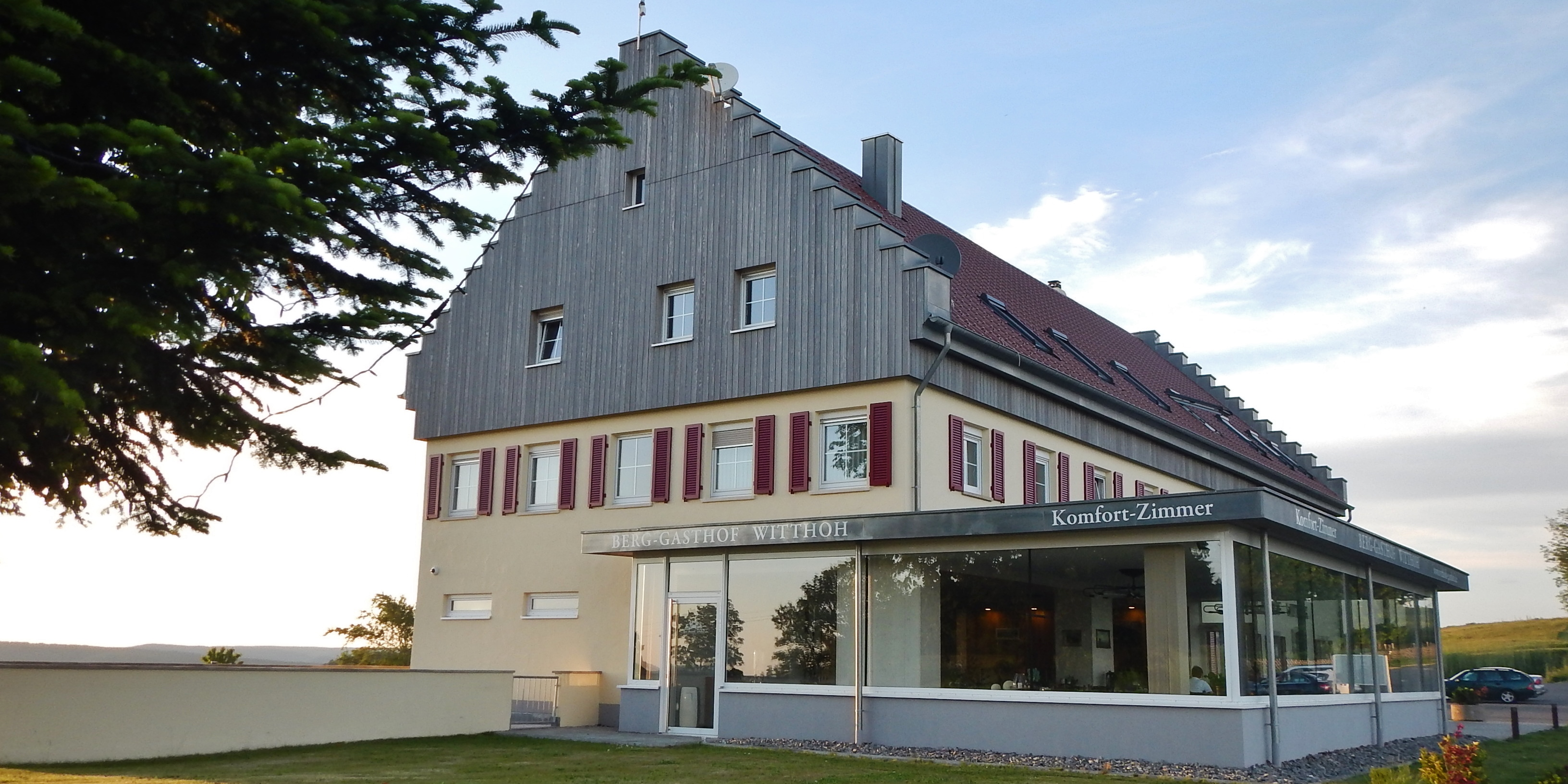 Berg-Gasthof Witthoh bei Immendingen-Hattingen